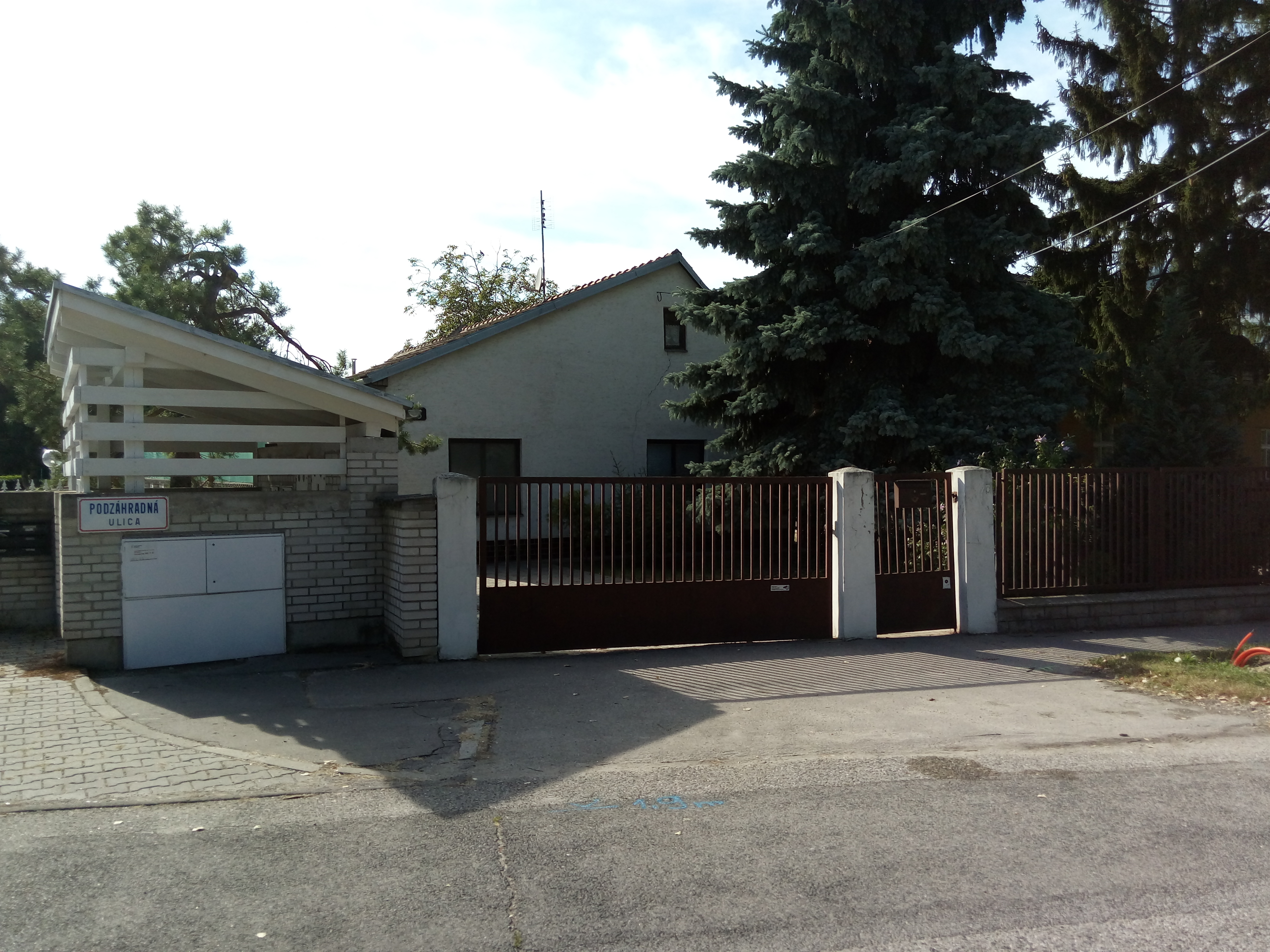 Podzáhradná 56, Podunajské Biskupice, Bratislava